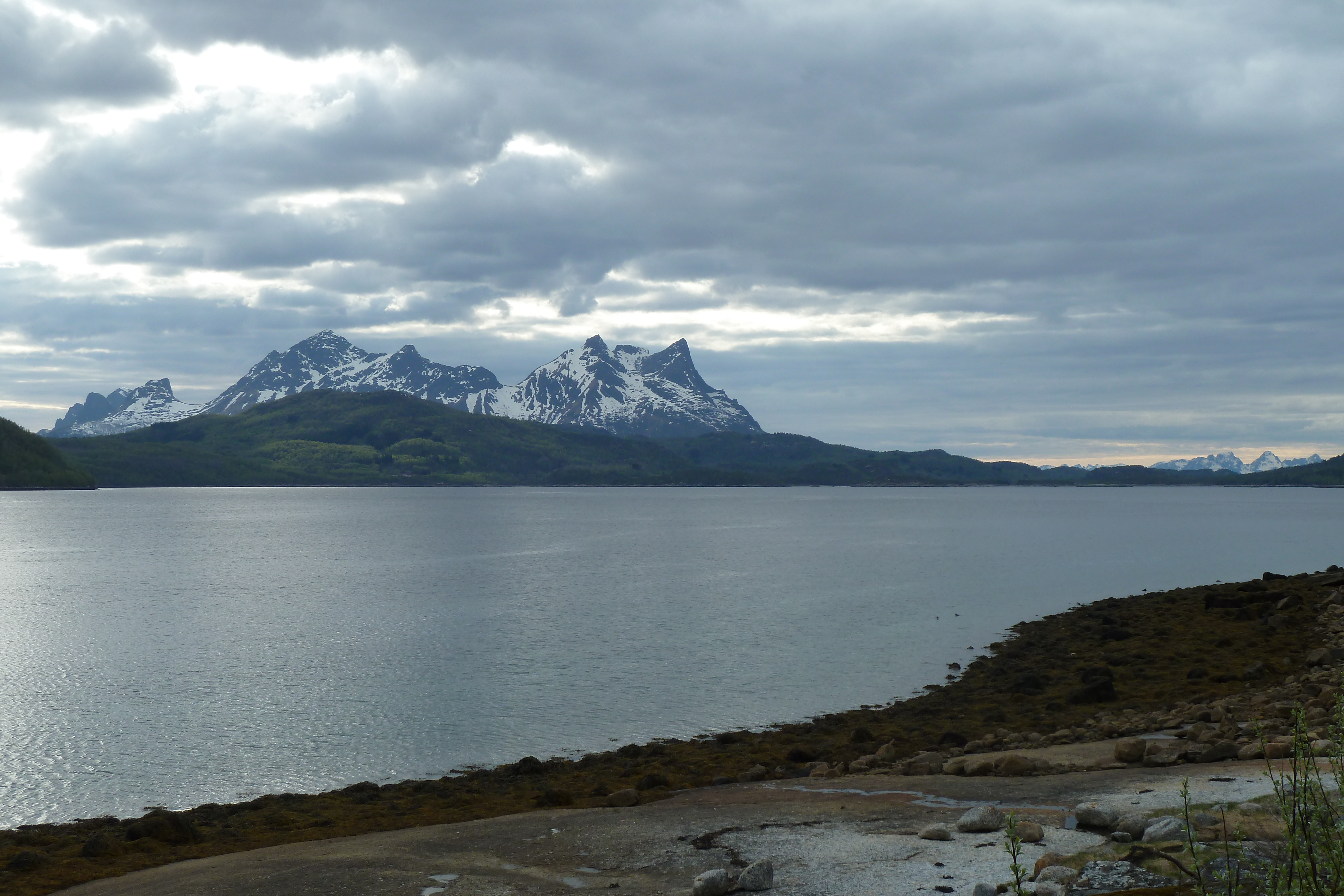 Den nordlige delen av Hamarøytindan mellom Hamnesfjellet og Eldridtinden. Sett fra Finnvika ved Fv81 i Hamarøy.